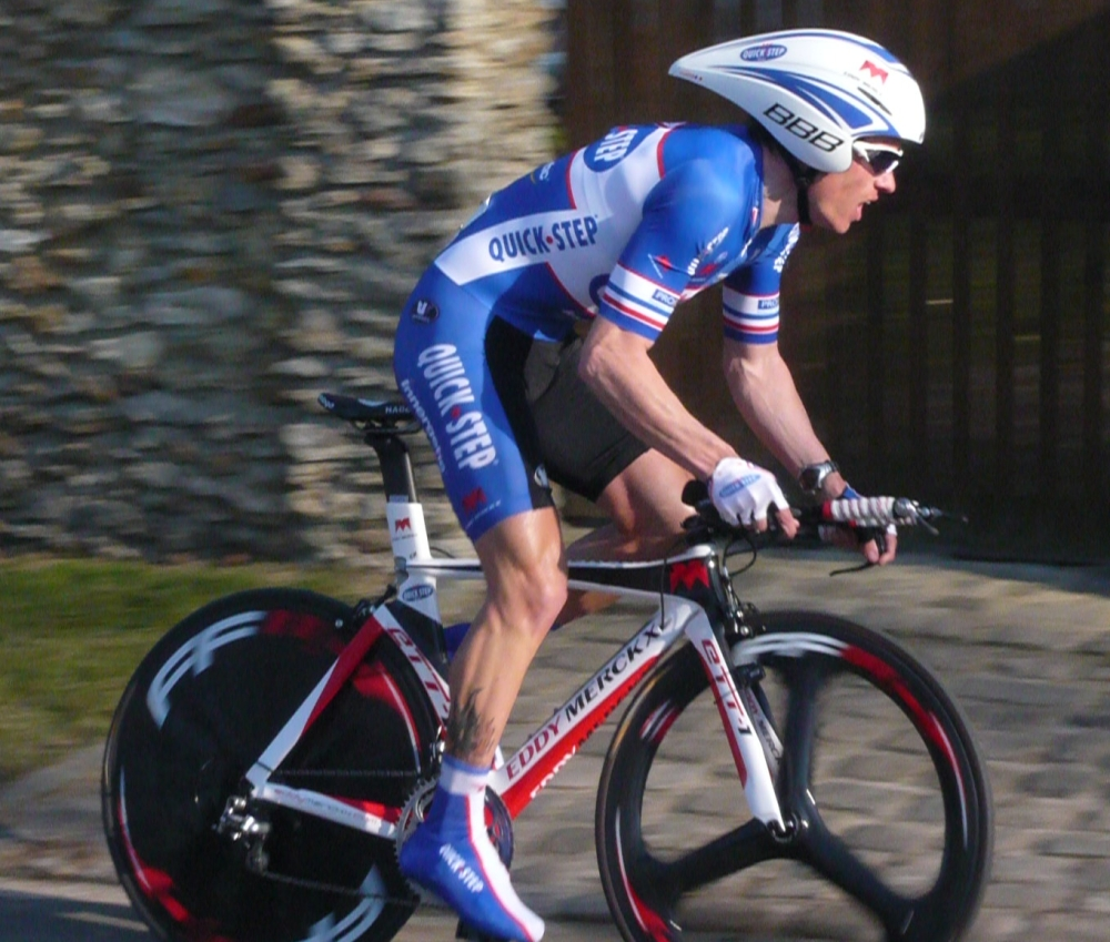 Chavanel paris nice 2010